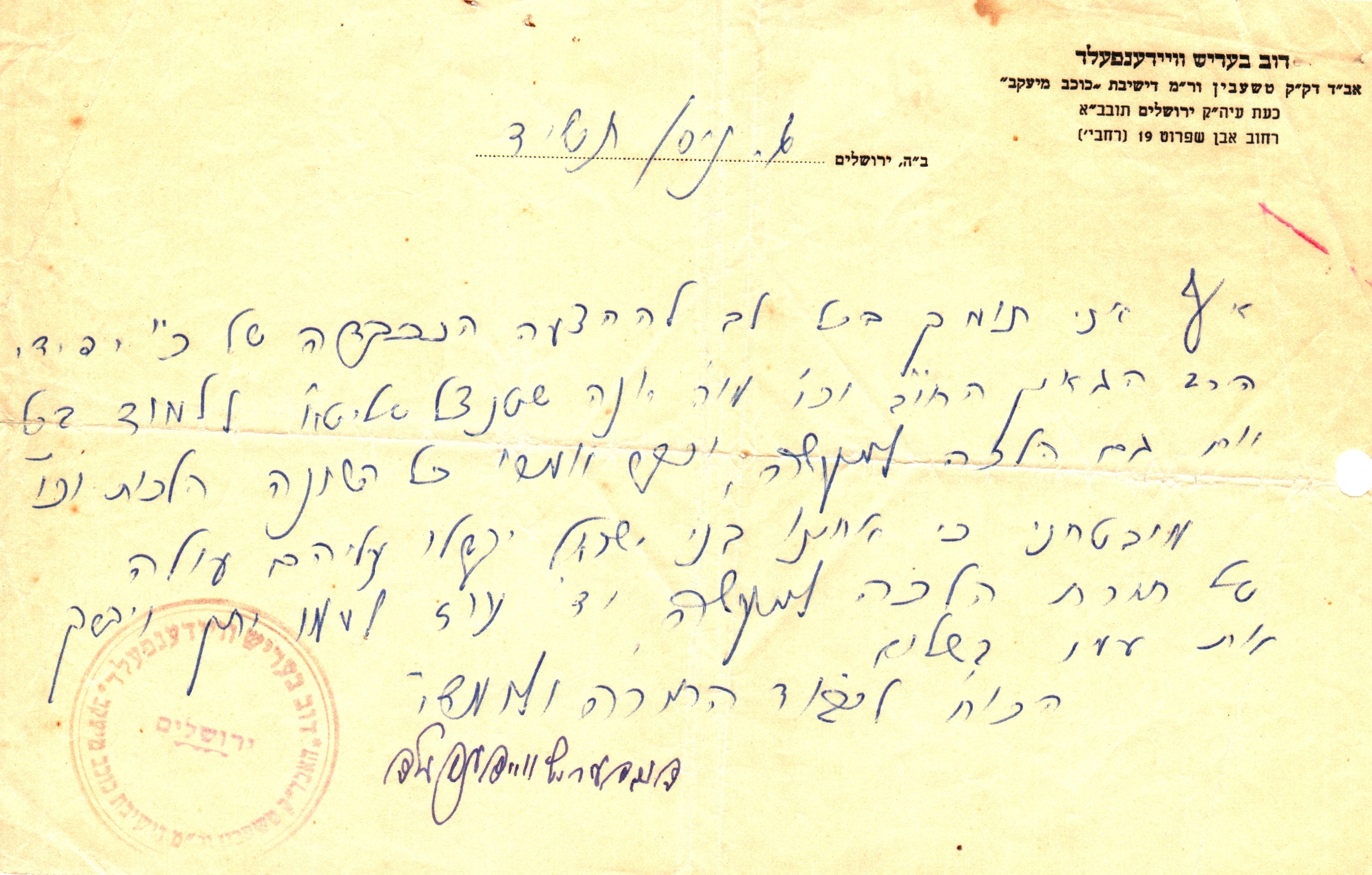 חתימתו של הרב מטעשבין הרב דוב בעריש וידנפלד על החשיבות לימוד הלכה יומית שיסד הרב יונה שטנצל